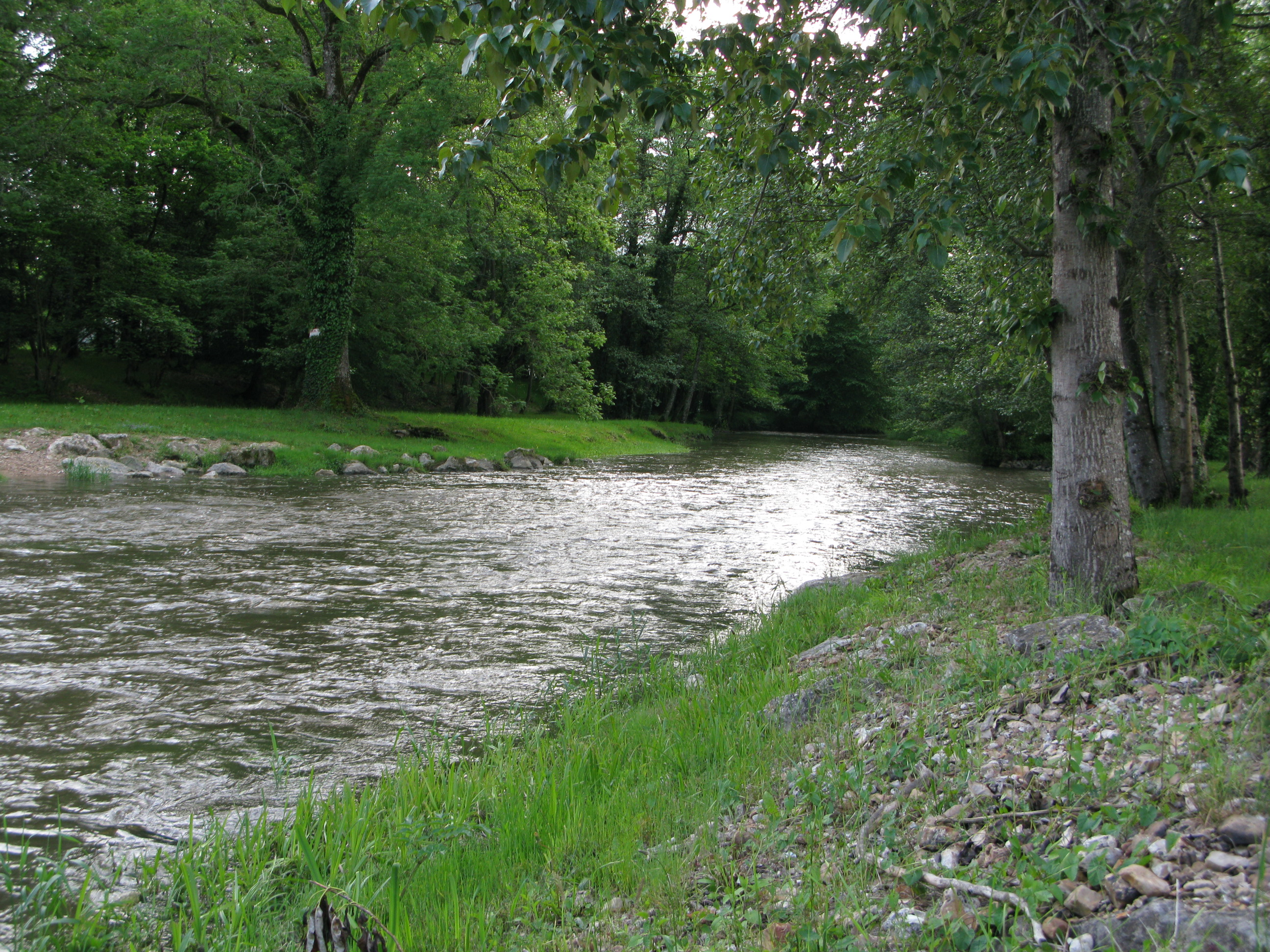 Le Petit-Sauldre lors de sa traversée de la commune de Ménétréol-sur-Sauldre